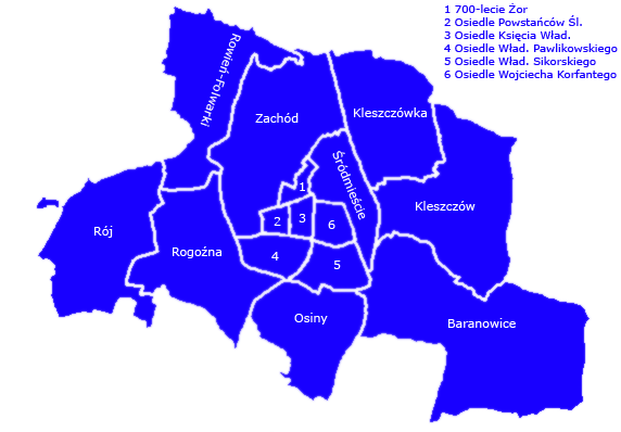 План на града.